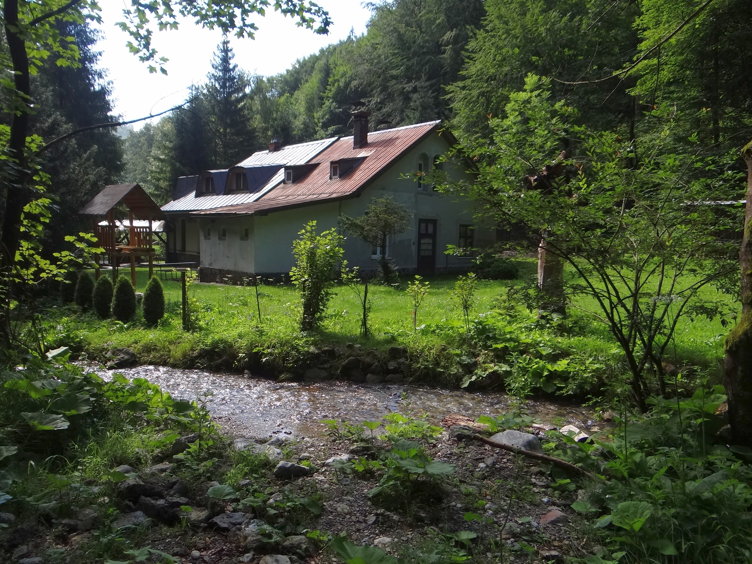 Wylot doliny Rakytow do Doliny Harmaneckiej. Dawna elektrownia